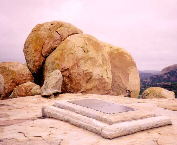 Grob Cecila Rodesa, Zimbabve Matobo Brda, Matopo nacionalni park, Decembar 2001, Autor Dr. Lj. Tanaskovic objavljeno po izricitom odobrenju autora